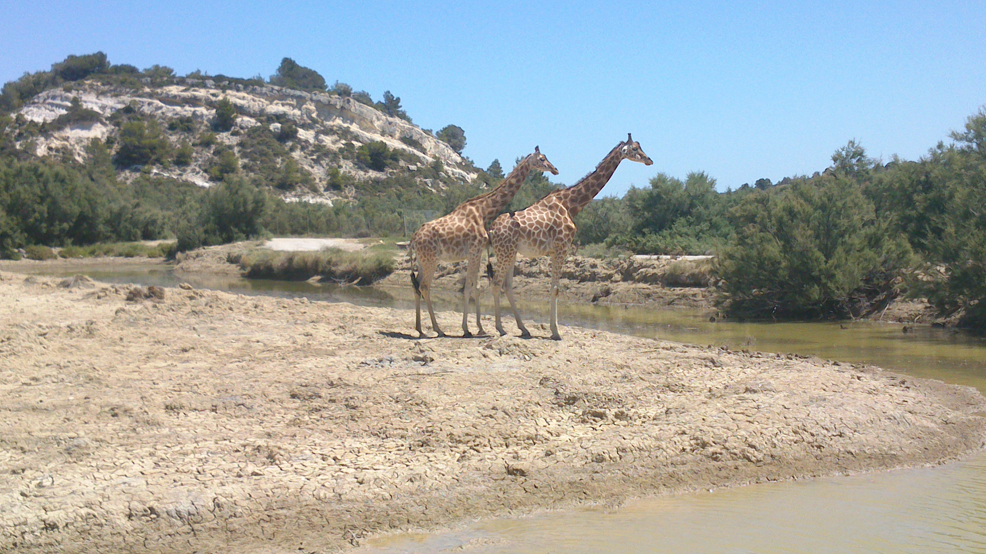 Girafes dans la réserve africaine de Sigean